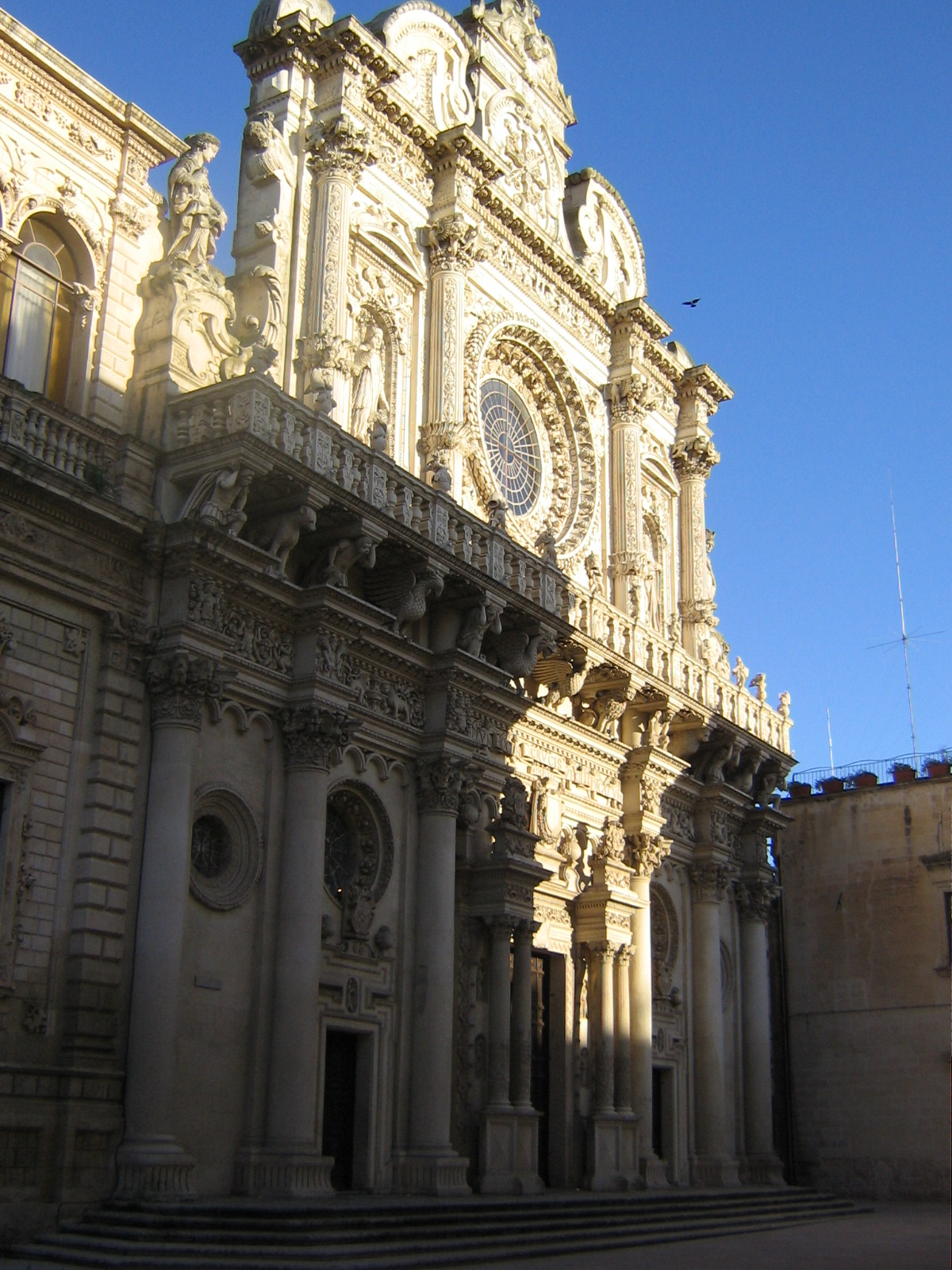 Basilica di Santa Croce